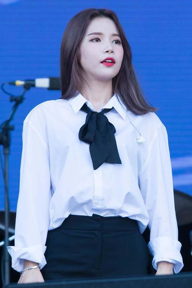 17.09.23 조이올팍페스티벌 - 마마무(MAMAMOO)